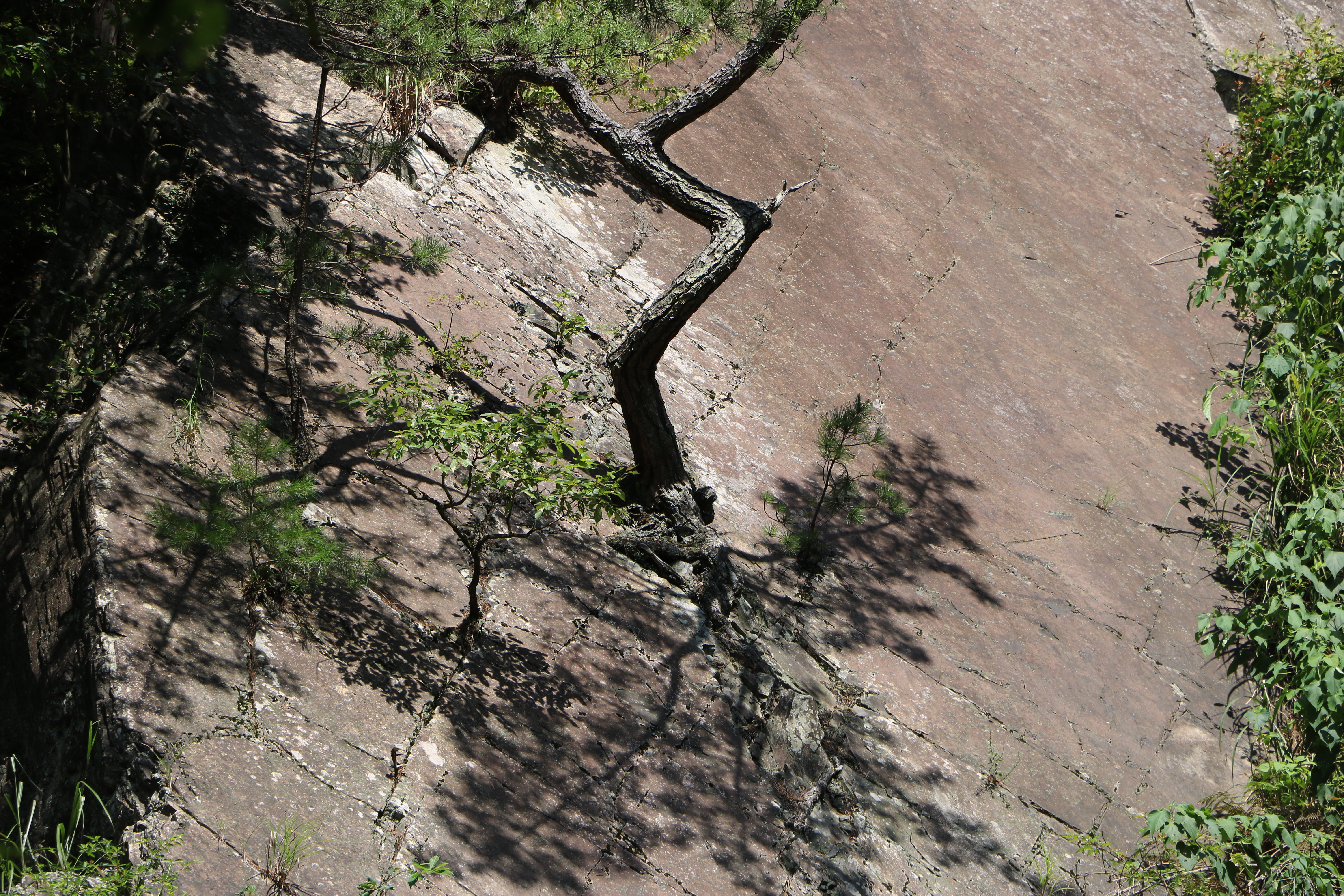 鎌掛の屏風岩（国指定天然記念物、滋賀県蒲生郡日野町）